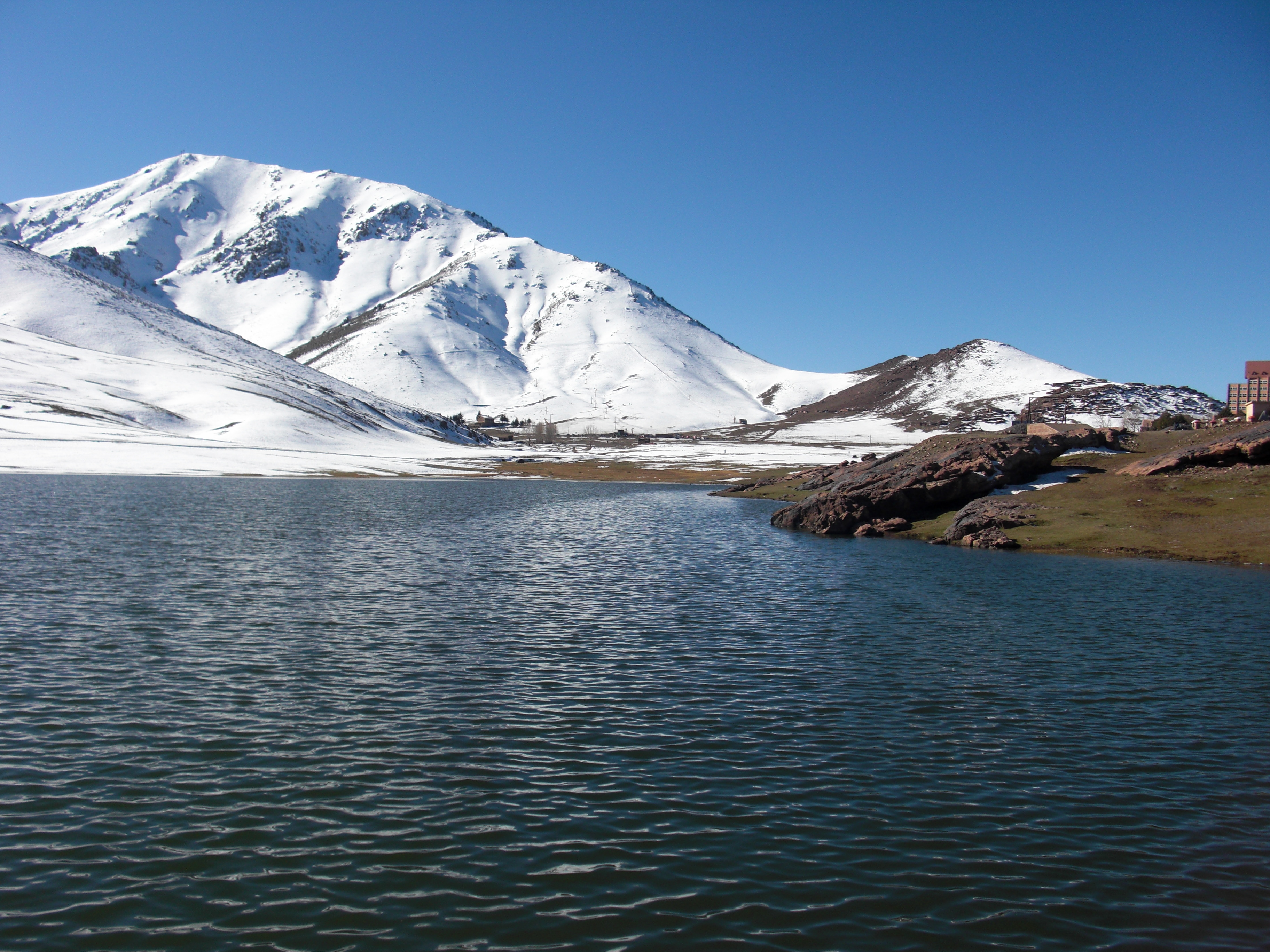 photo du mont oukaimden